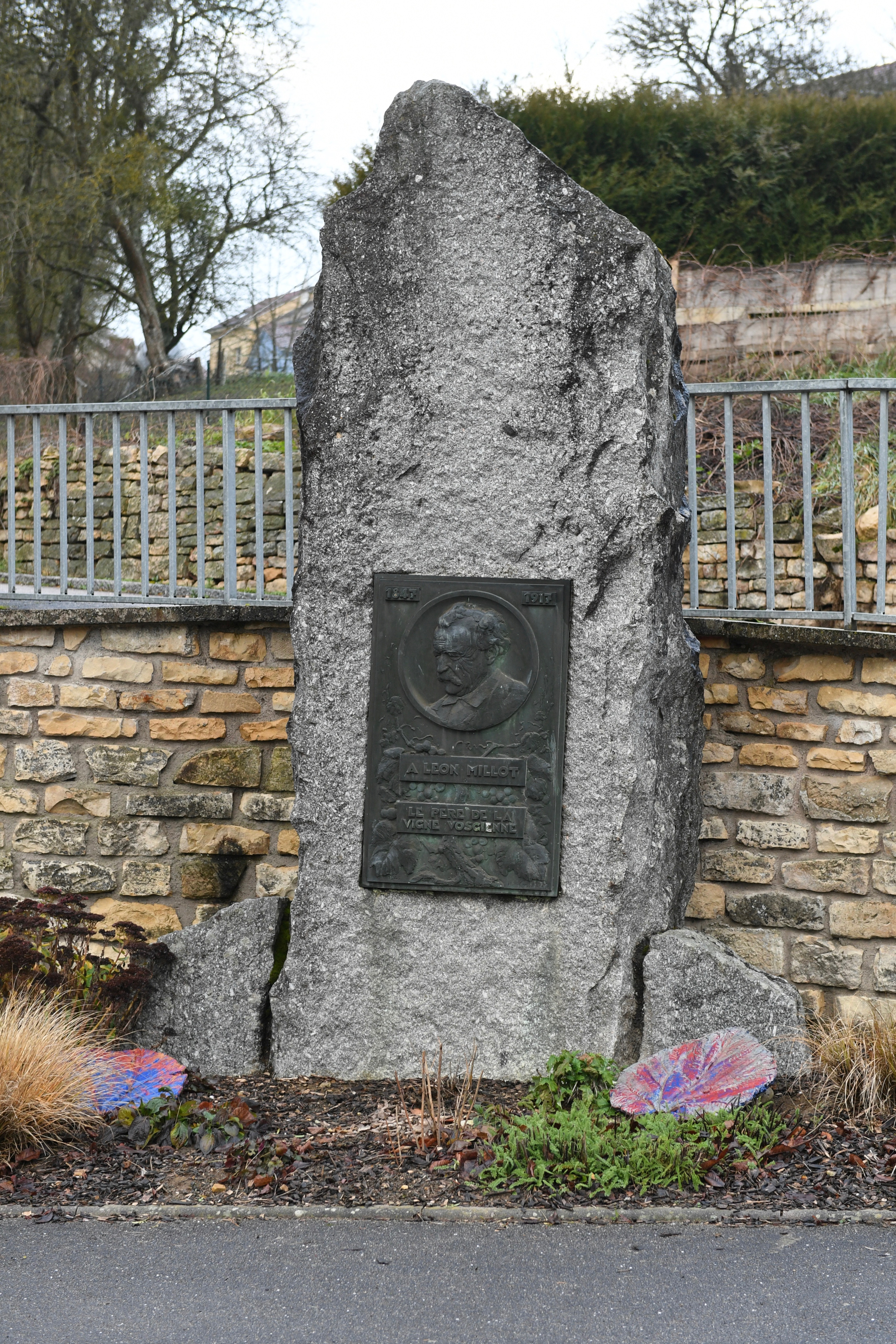 Monument à la mémoire de Léon Millot, père de la vigne vosgienne à Mandres sur Vair (88)